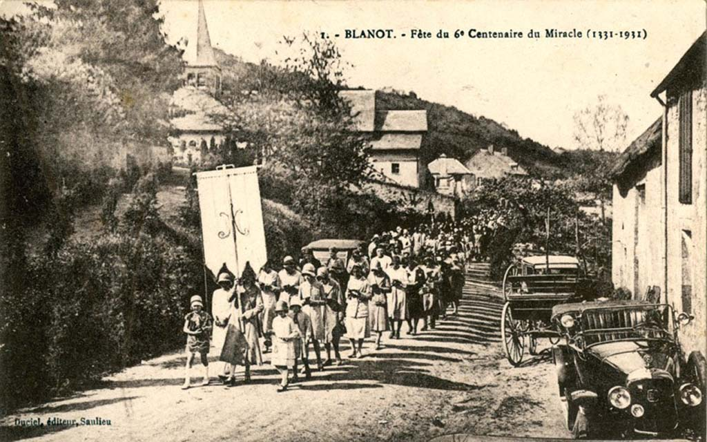 Procession démarrant de l'église Saint-Andoche-et-Saint-Thyrse de Blanot, en la Fête-Dieu (1931 - 6e centenaire du miracle).